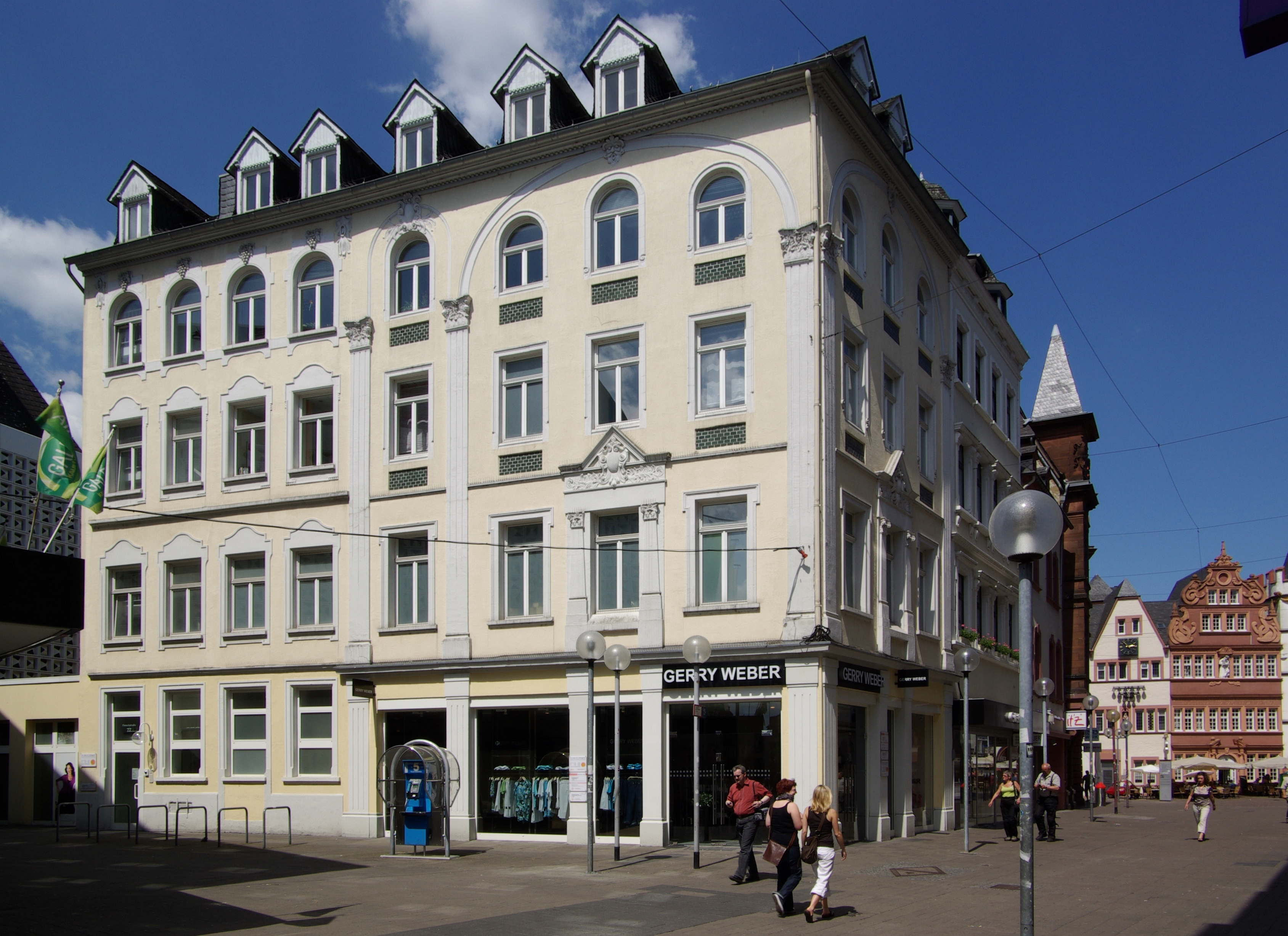 Trier, Fleischstraße 77/78: späthistoristische sandsteingegliederte Putzfassaden des viergeschossigen Eckwohn- und Geschäftshauses, um 1905; straßenbildprägend